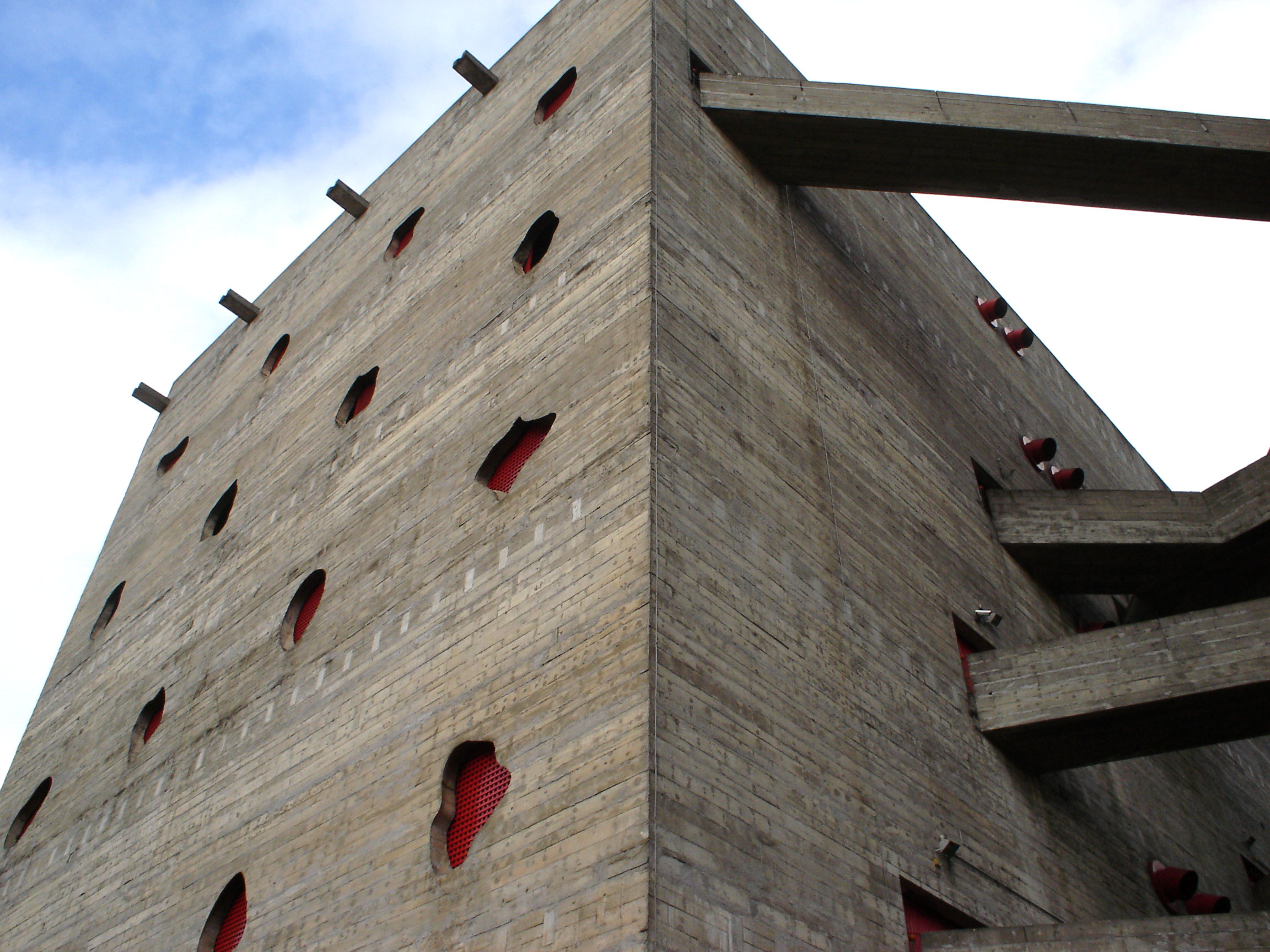 São Paulo, Brasil. Dezembro de 2010. Facebook || Instagram || Tumblr || Twitter || VSCO Grid